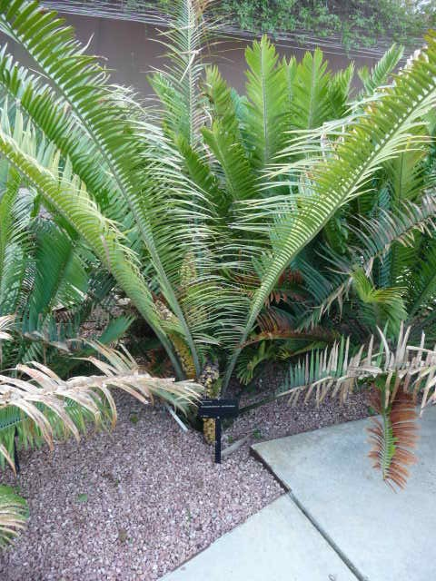 Encephalartos senticosus vista lateral al Jardí botànic de Barcelona.